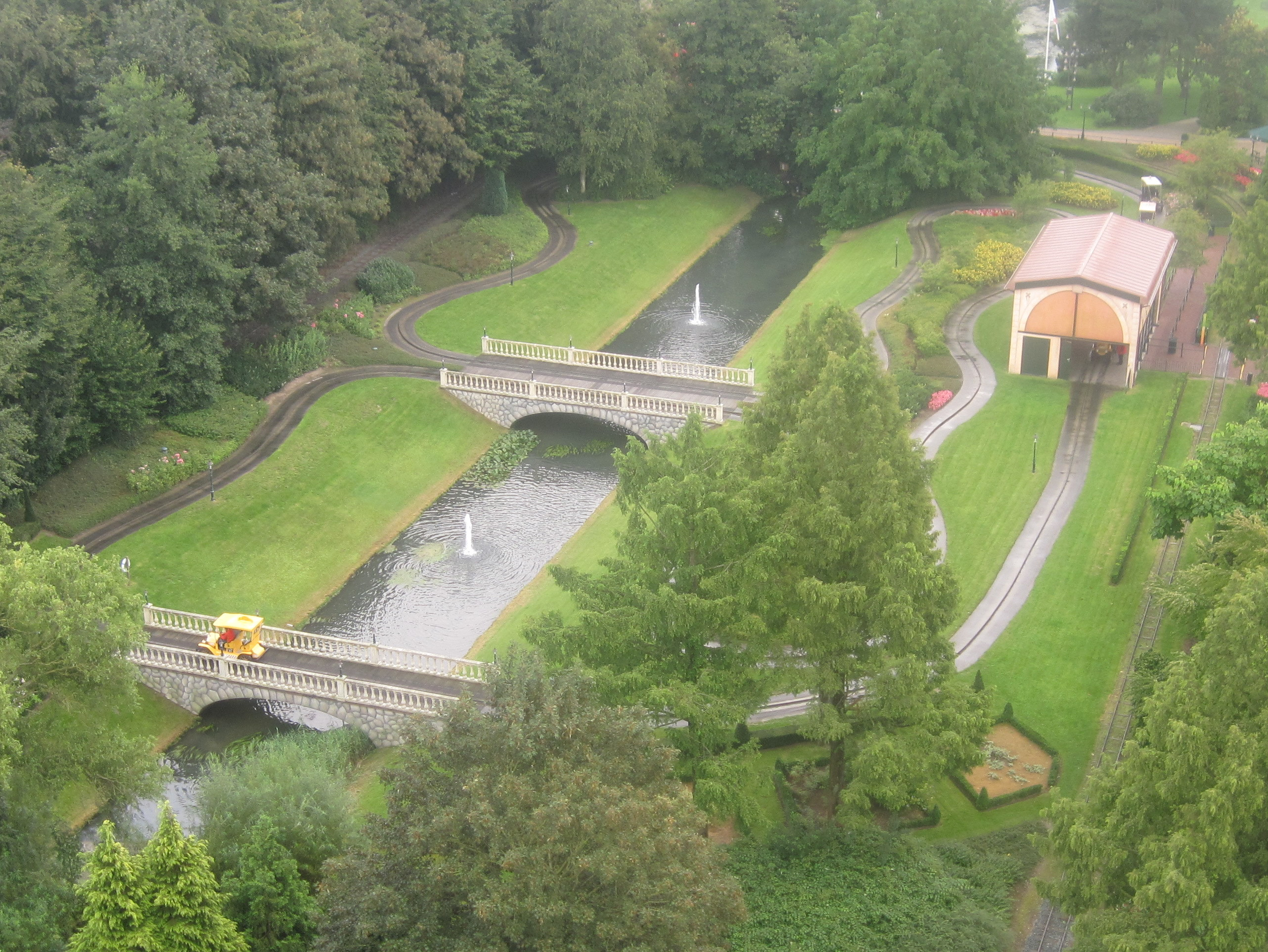 Les Tour des Jardins Walibi Holland parcour